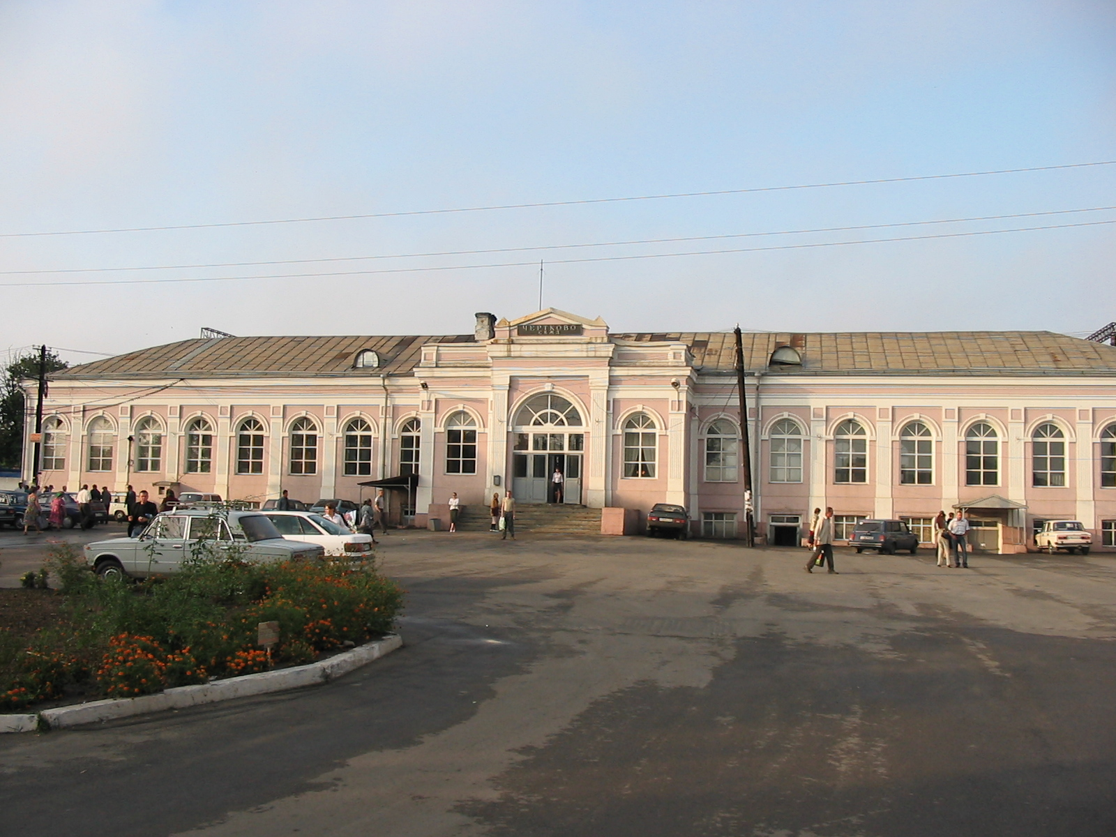 Ж.д. вокзал на станции Чертково - вид со стороны привокзальной площади